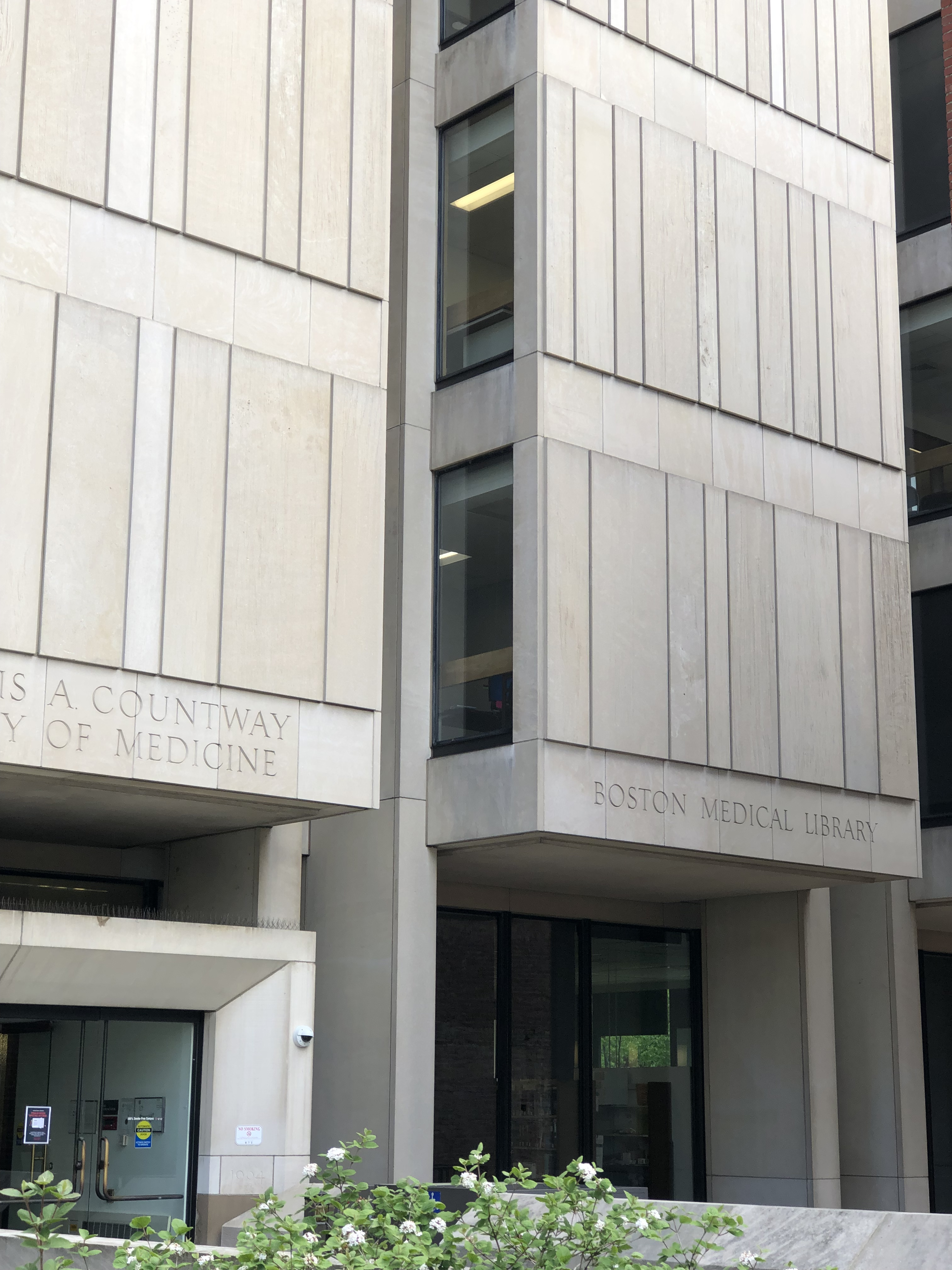 library